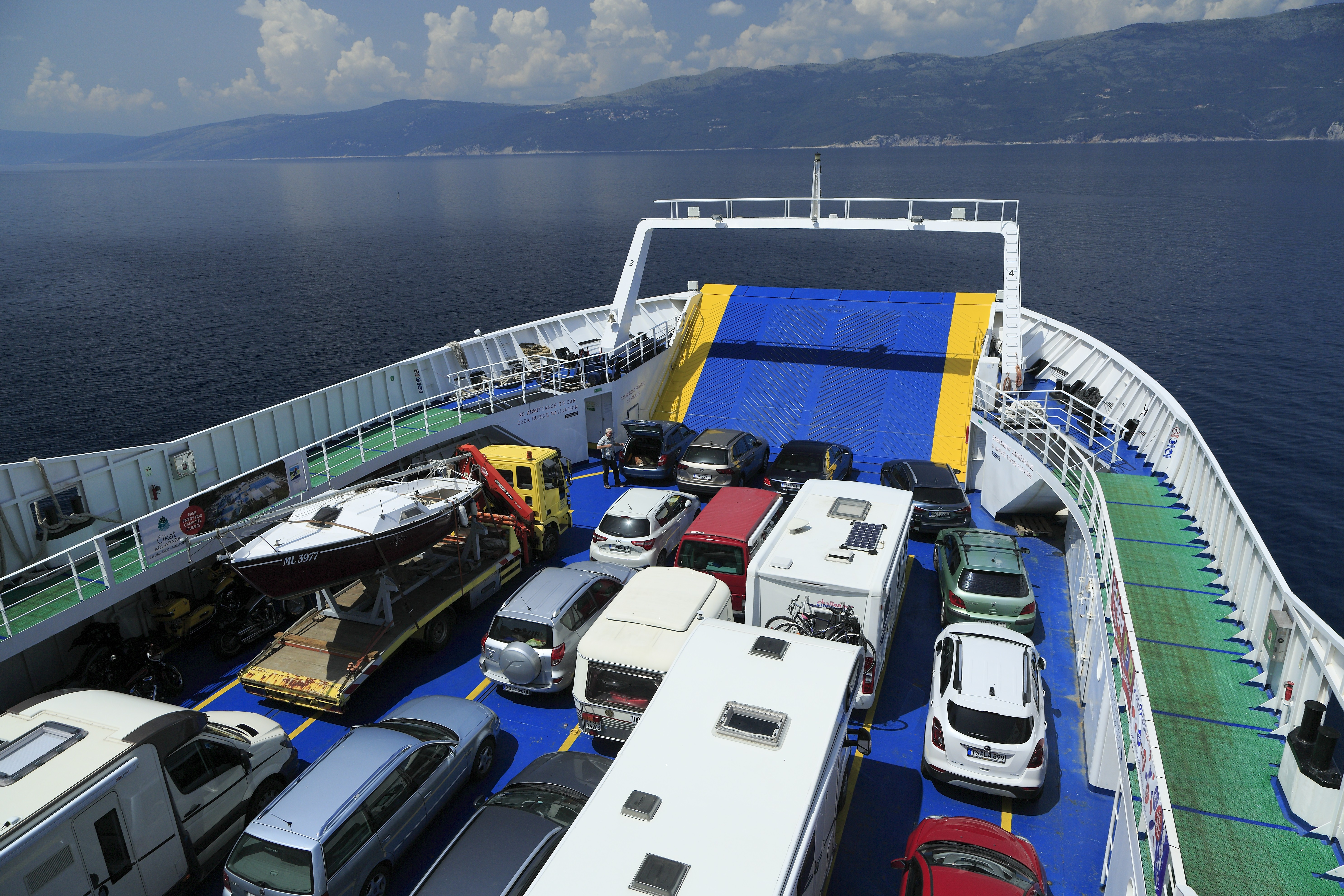 Motorfährschiff Bol auf Fahrt von Porozina auf Cres nach Brestova an der istrischen Ostküste